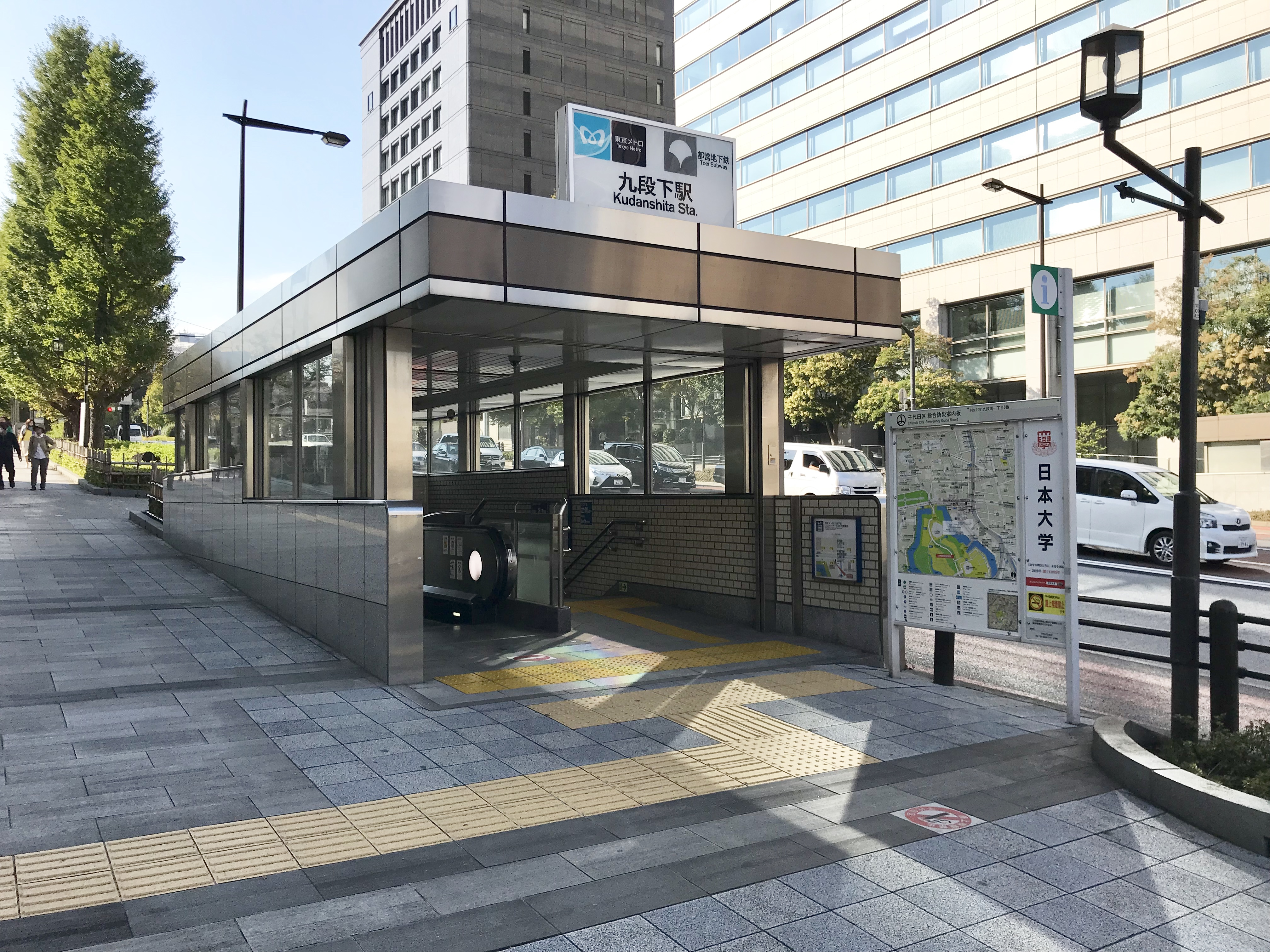 東京メトロ東西線・半蔵門線・都営地下鉄新宿線九段下駅4番出入口